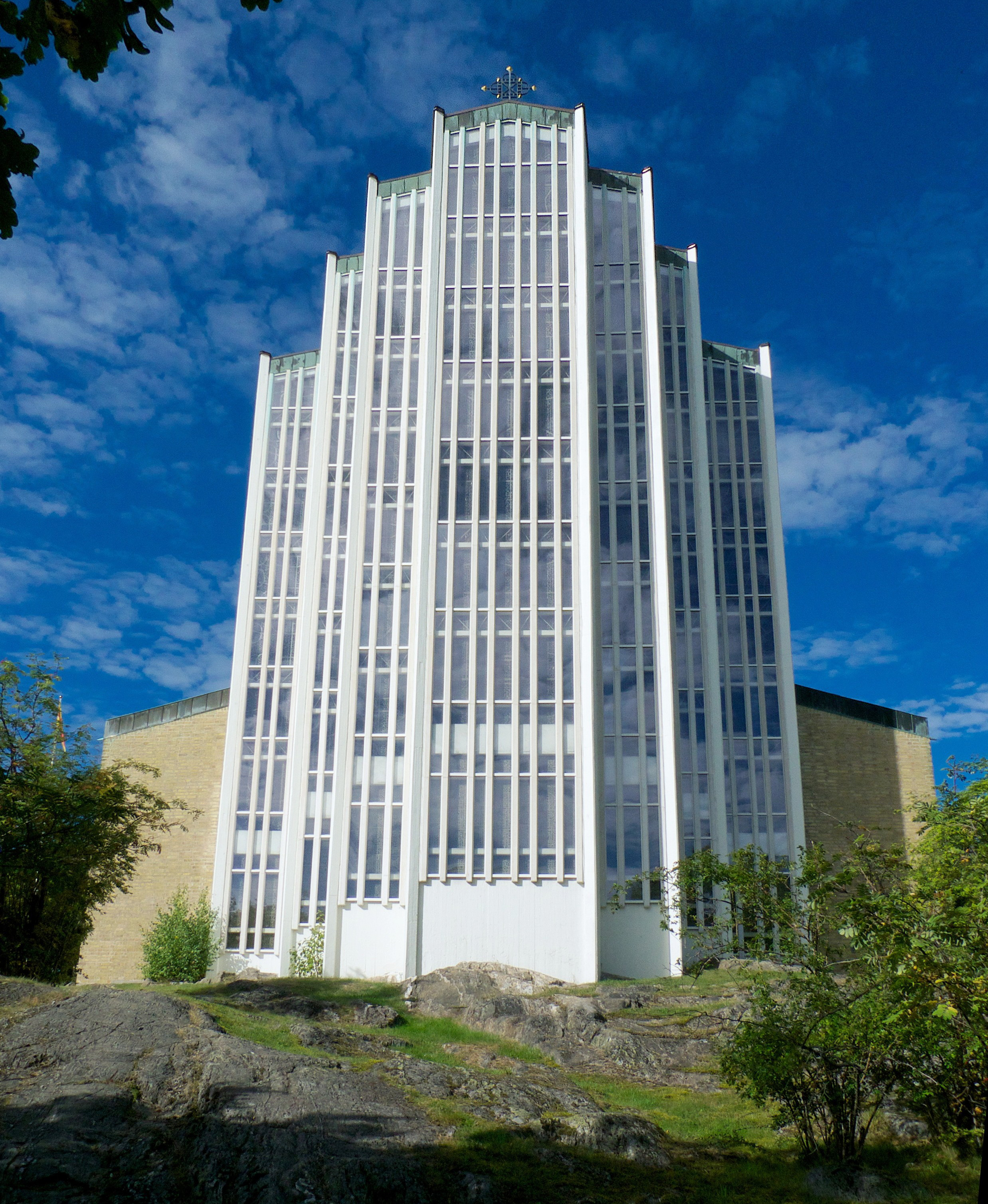 Uppenbarelsekyrkan (Papperskniven 13)